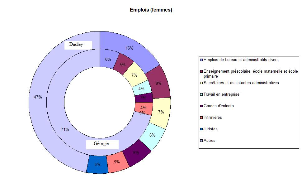 Emplois féminins à Dudley (Géorgie, États-Unis) et dans le reste de l’État